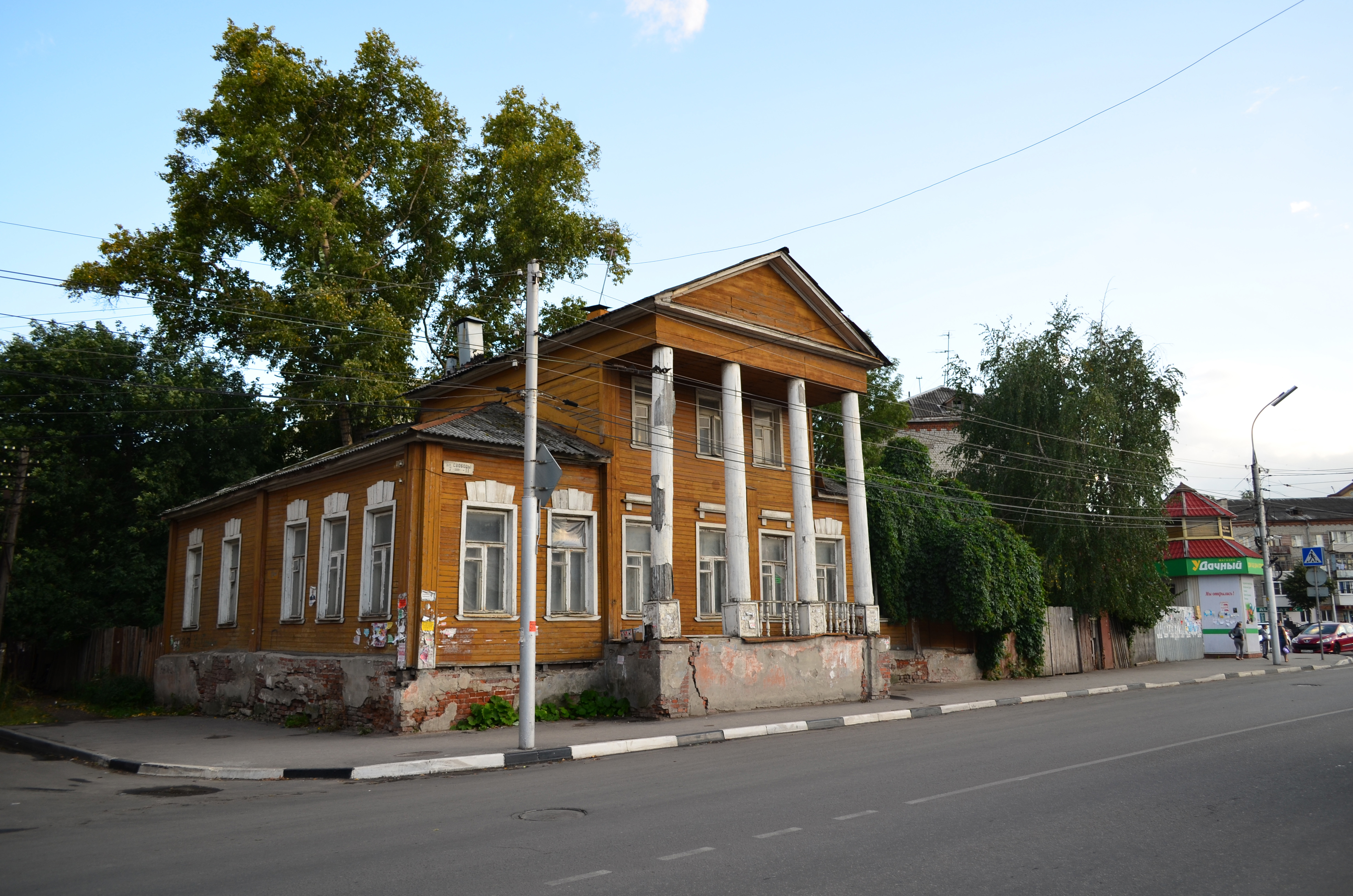 .Рязань,улица Свободы,дом 7.Бывший дом дворян Херасковых.